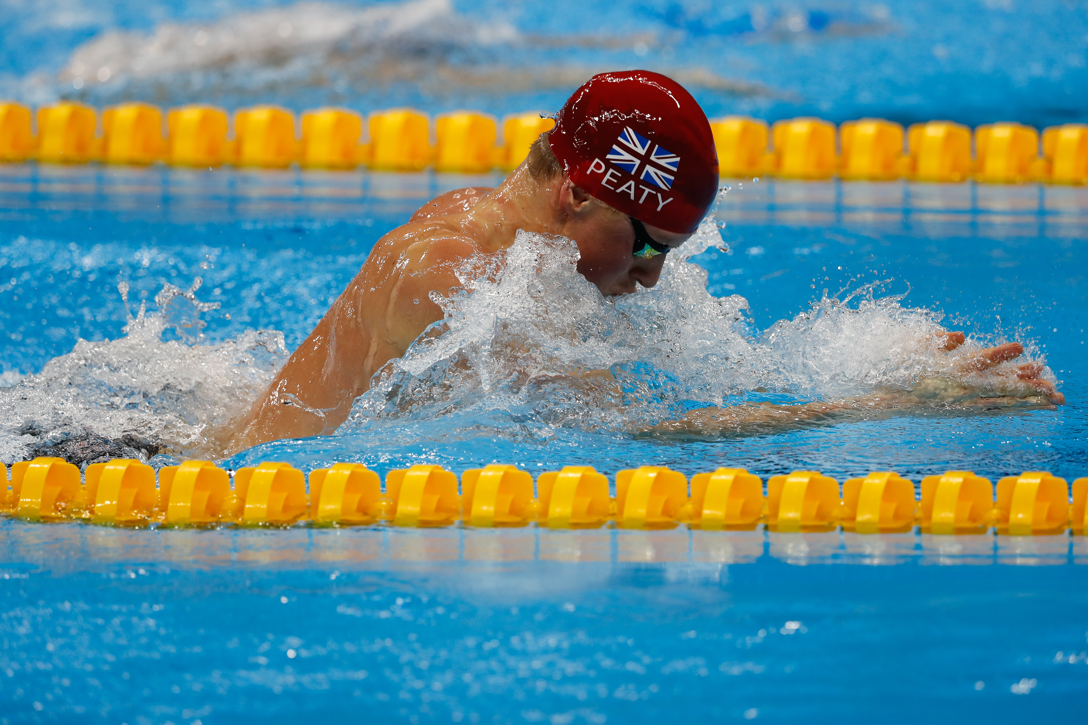 Rio de Janeiro - Nadadora norte-americana Katie Ledecky bate recorde mundial e leva medalha de ouro nos 400m livre nos Jogos Olímpicos Rio 2016 (Fernando Frazão/Agência Brasil)